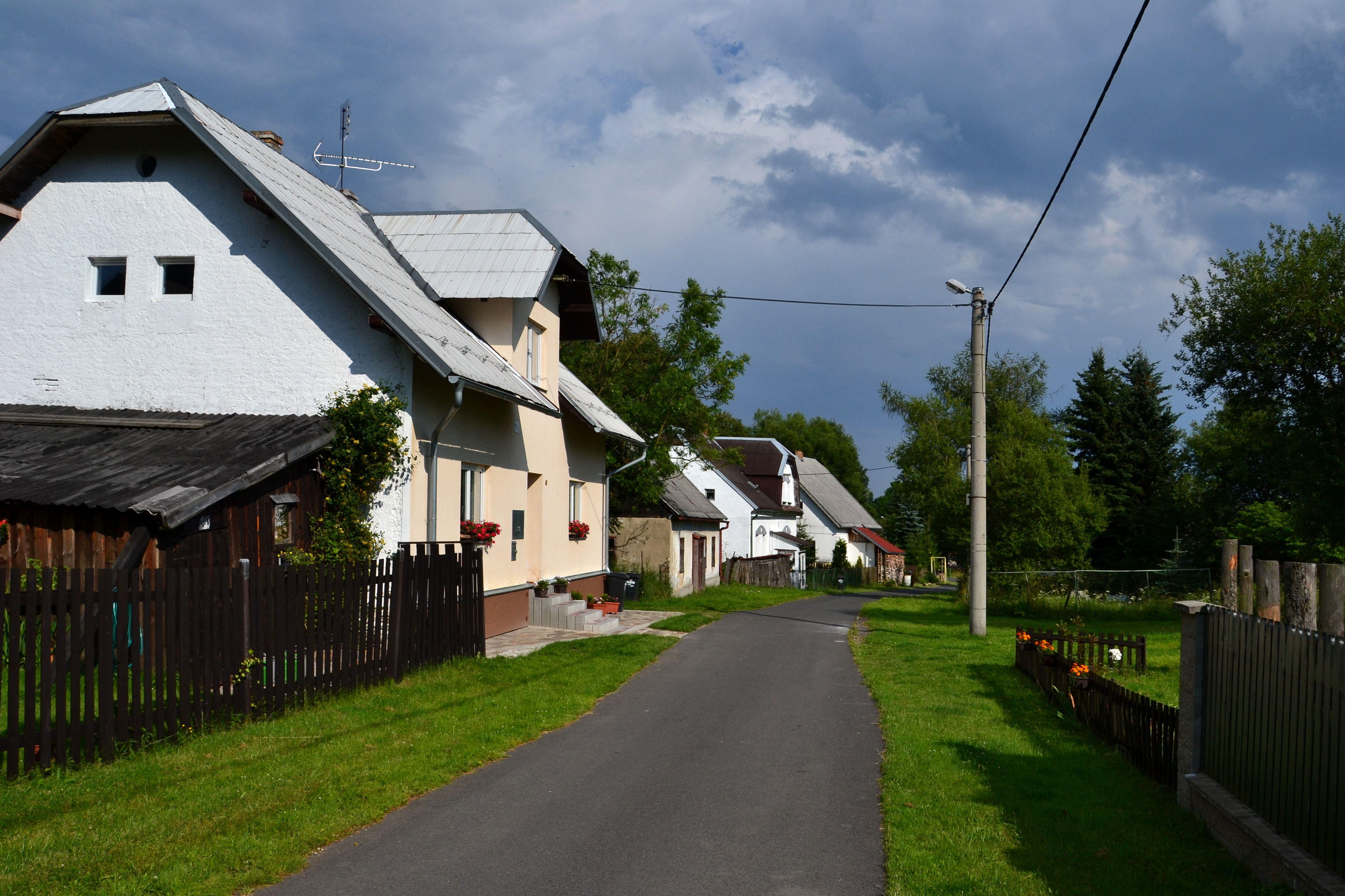 Domy v hlavní ulici